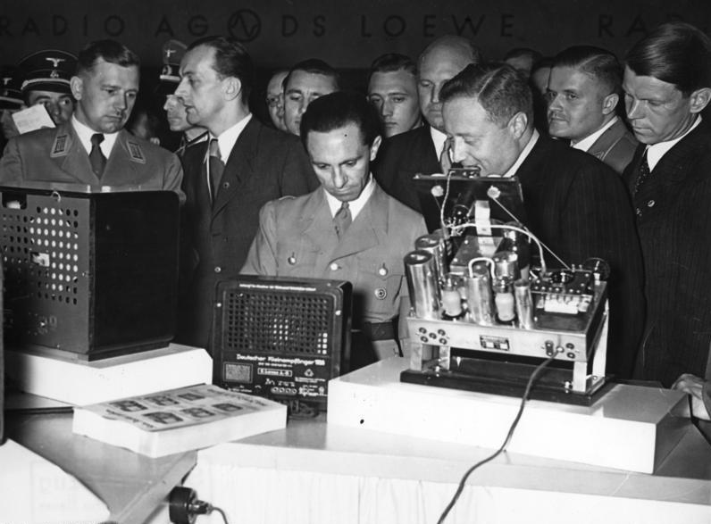 Reichsminister Dr. Goebbels auf der Funkausstellung Dr. Goebbels besichtigt auf dem Stand der Ostmark den deutschen Kleinempfänger für RM 35,-- , links auf dem Bilde Präsident der Reichsrundfunkkammer Dr. Kriegler